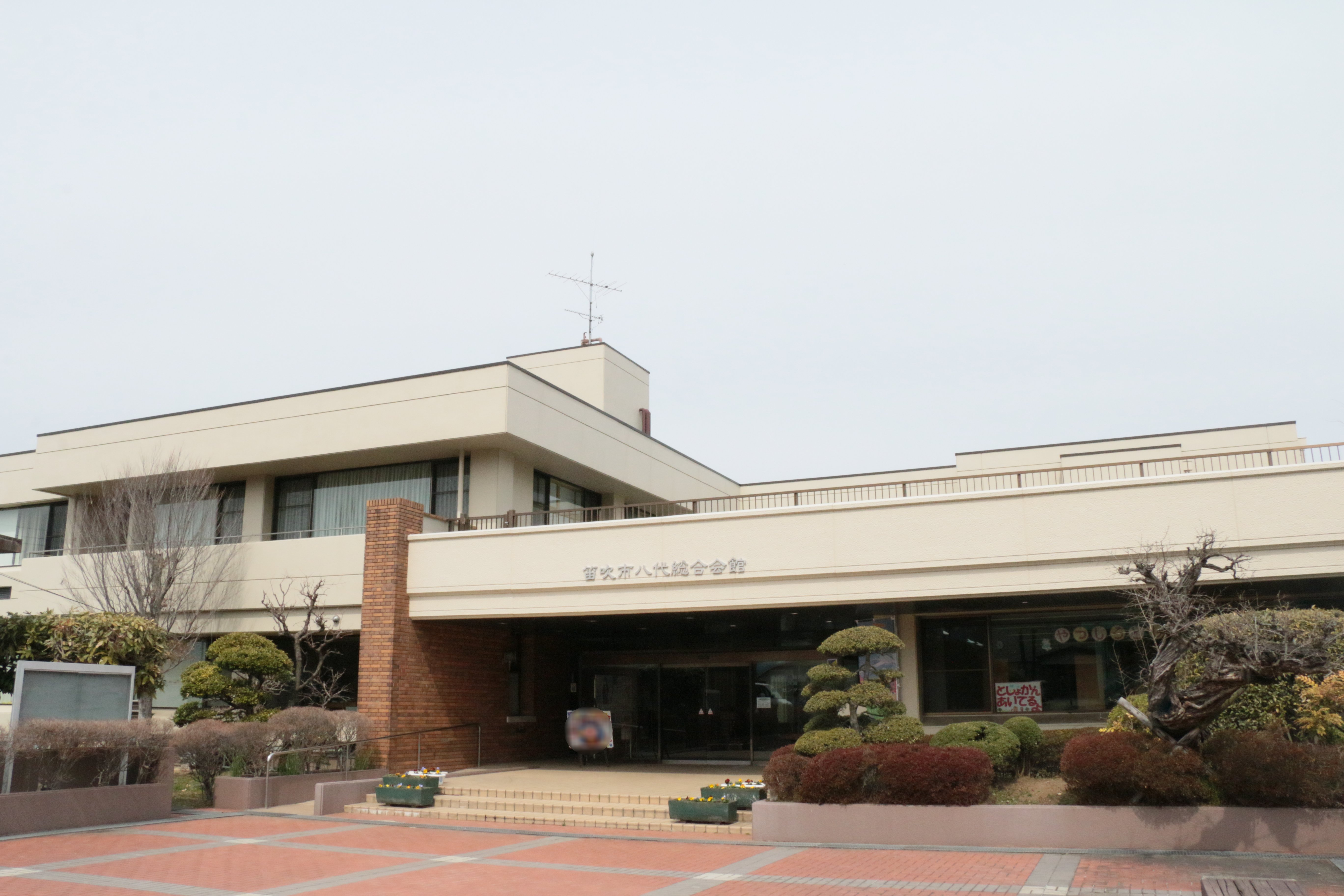 笛吹市八代図書館